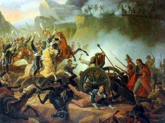 Peinture par Janvier Suchodolski-1875. Huile sur toile